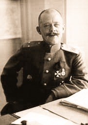 Генерал В.В.Марушевский (1874-1952)